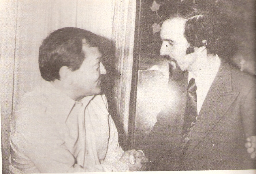 escritor suizo erich von daniken y escritor español antonio las heras